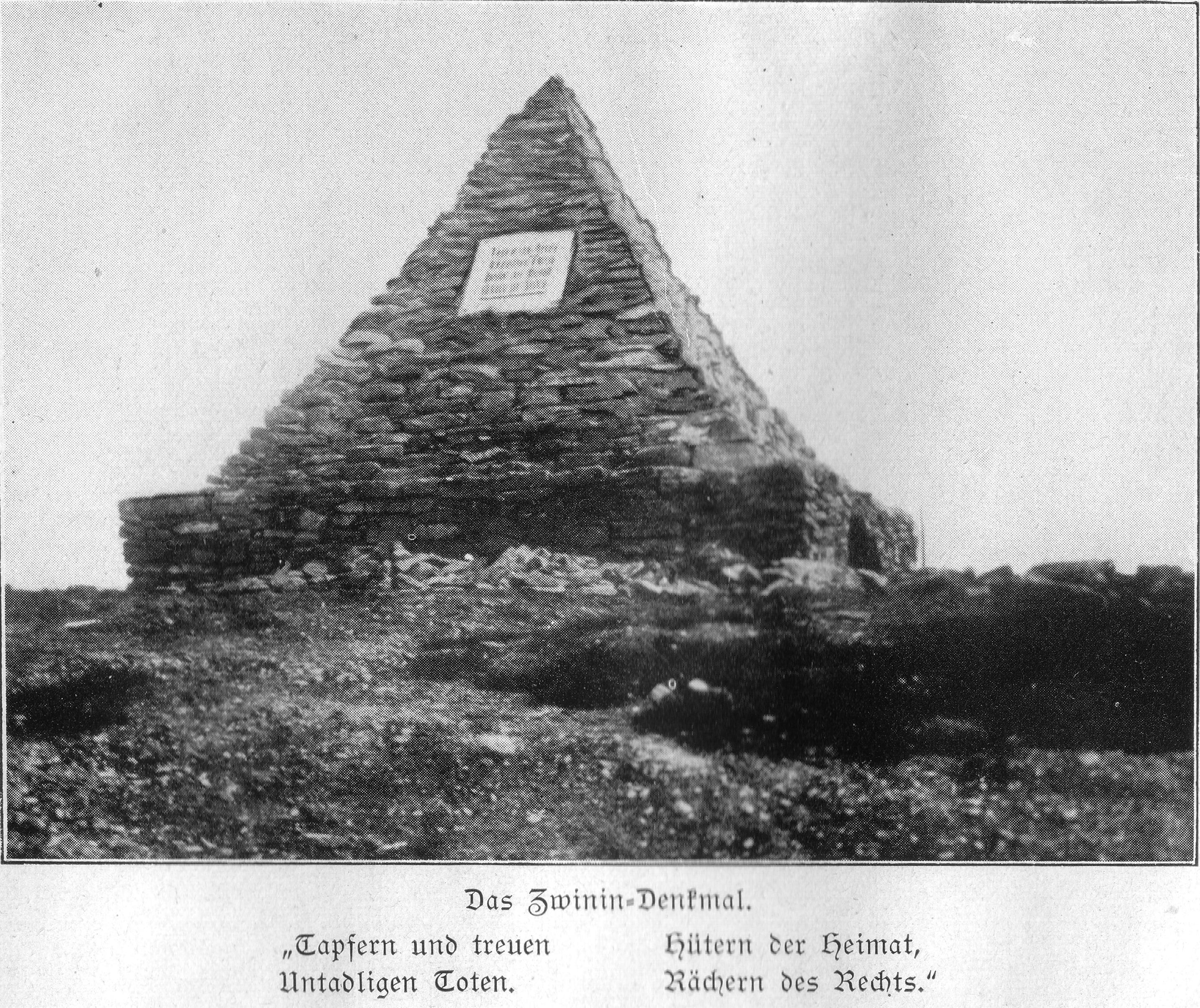 Denkmal auf dem Zwinin